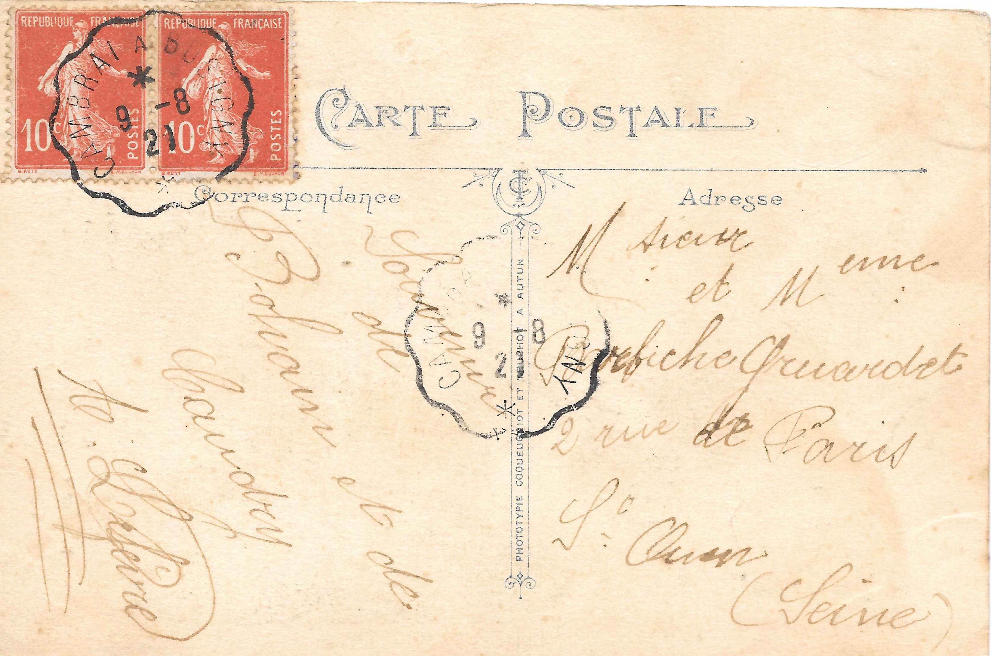 Cachet d'ambulant postal sur la ligne de Busigny à Cambrai